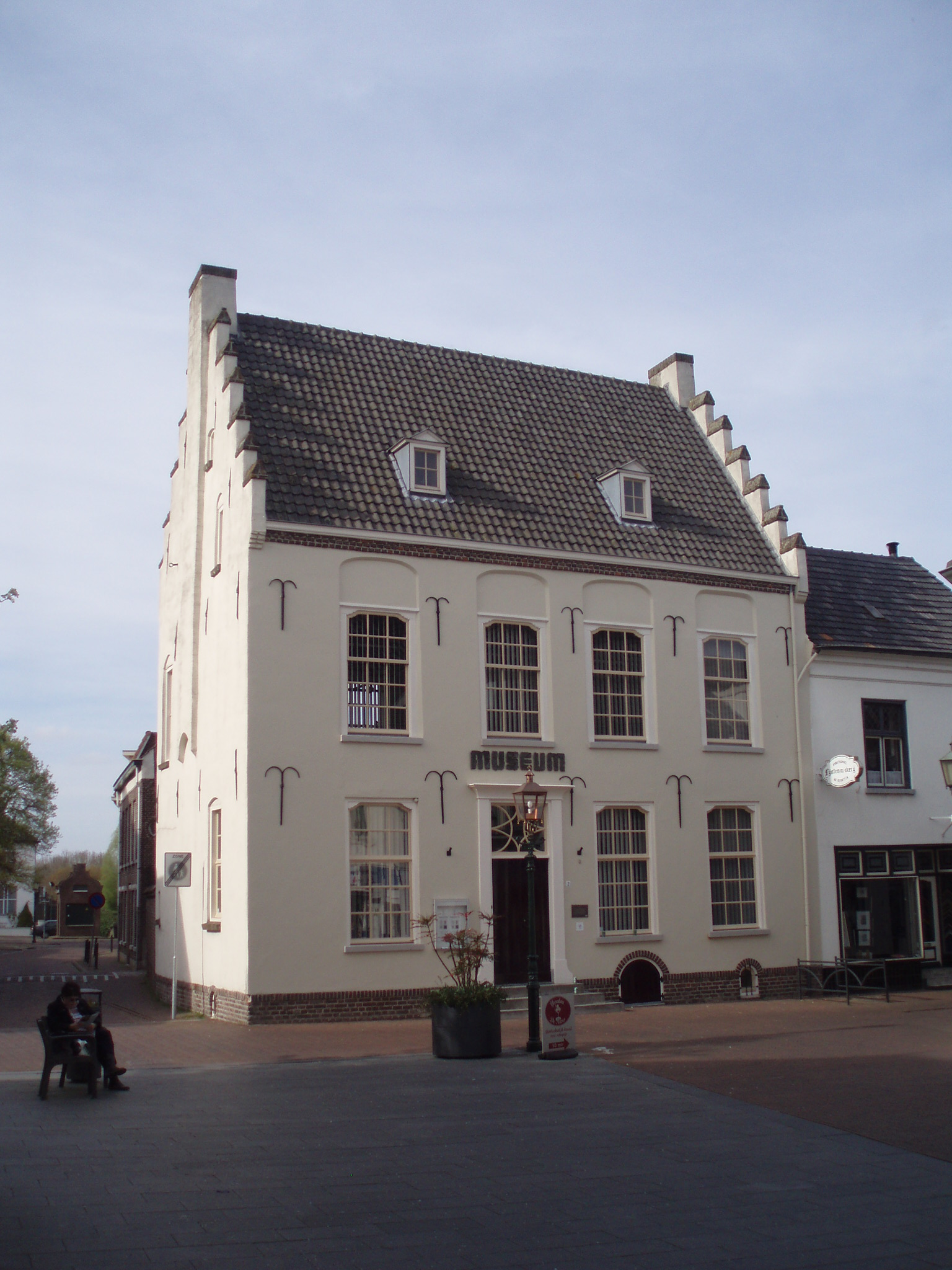 eigen foto Looi, april 2007, Museum Het Petershuis, Gennep